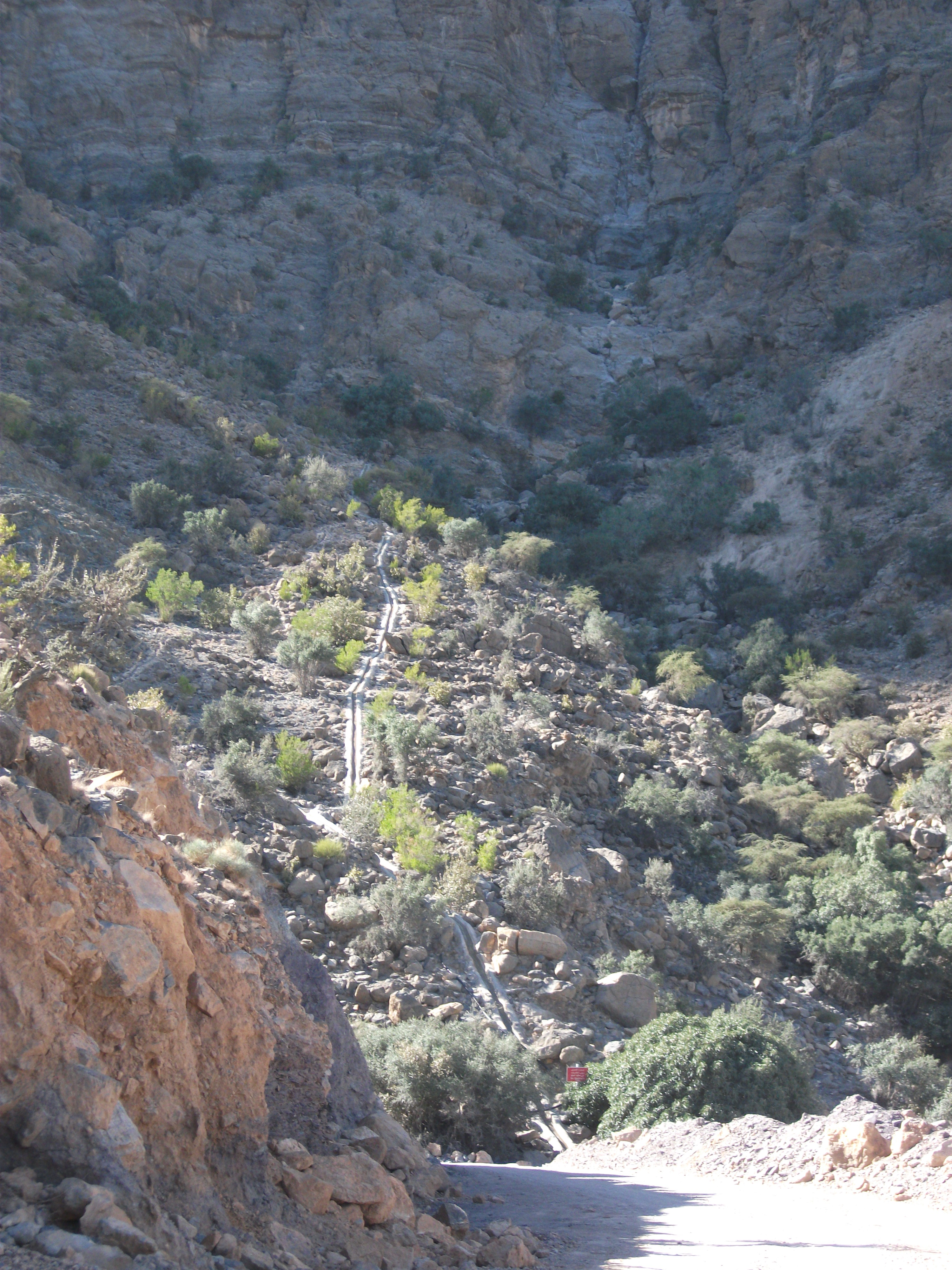 "Falaj" irrigationsystem